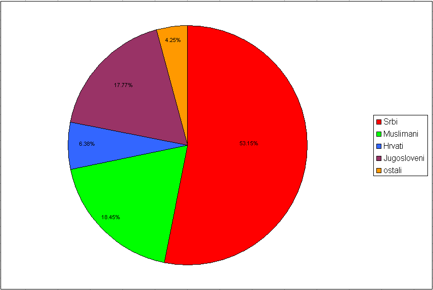 Etnički_sastav_Starčevice_1991._godine